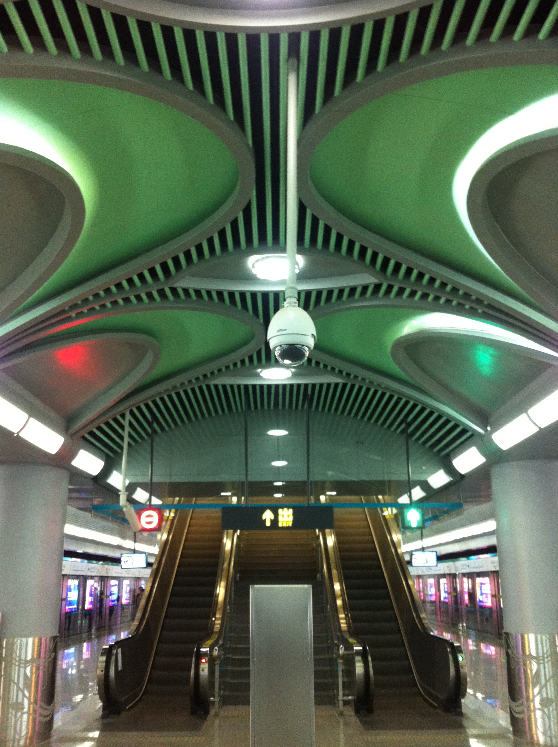 中文（中国大陆）: 昆明轨道交通6号线机场中心站站台